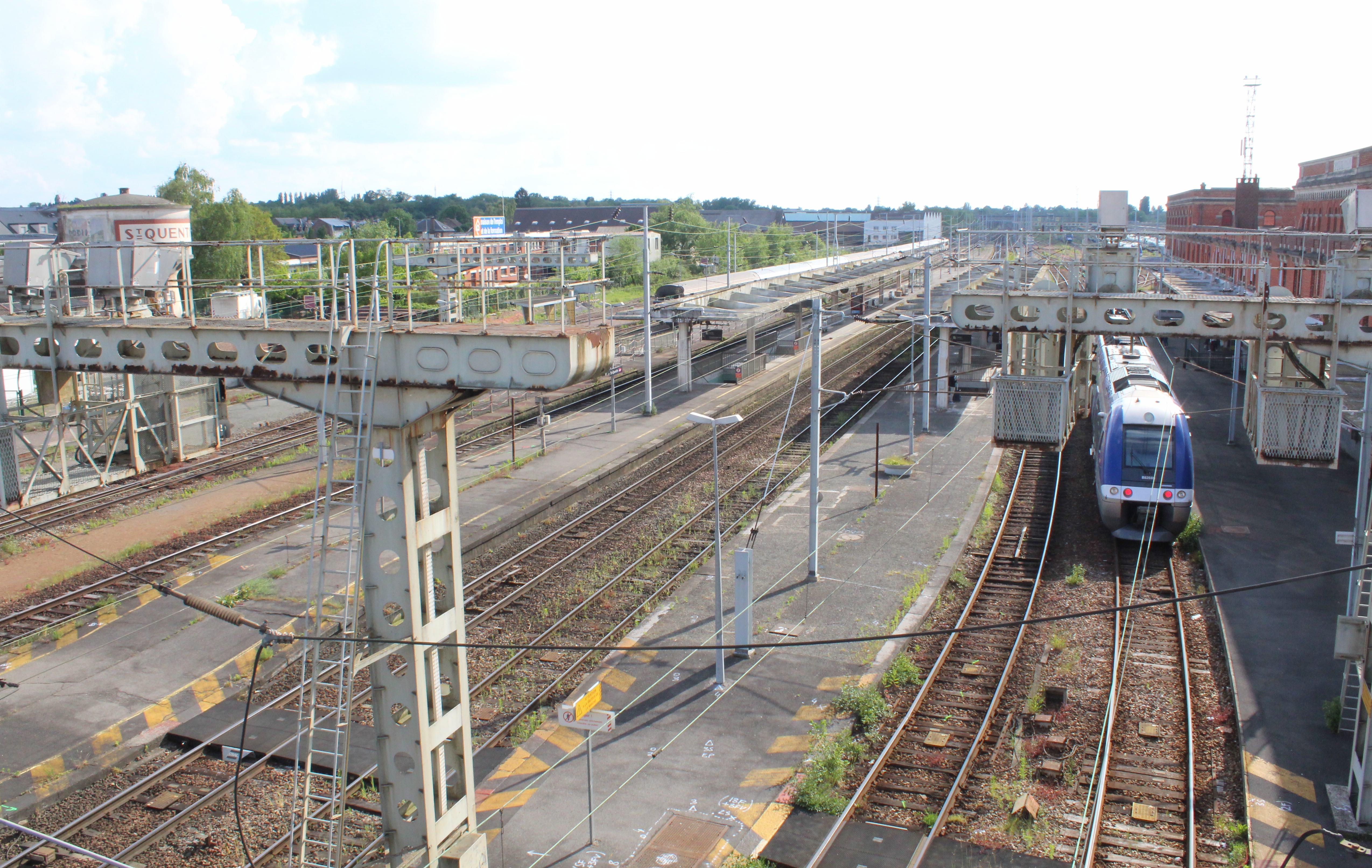 Les quais de la gare